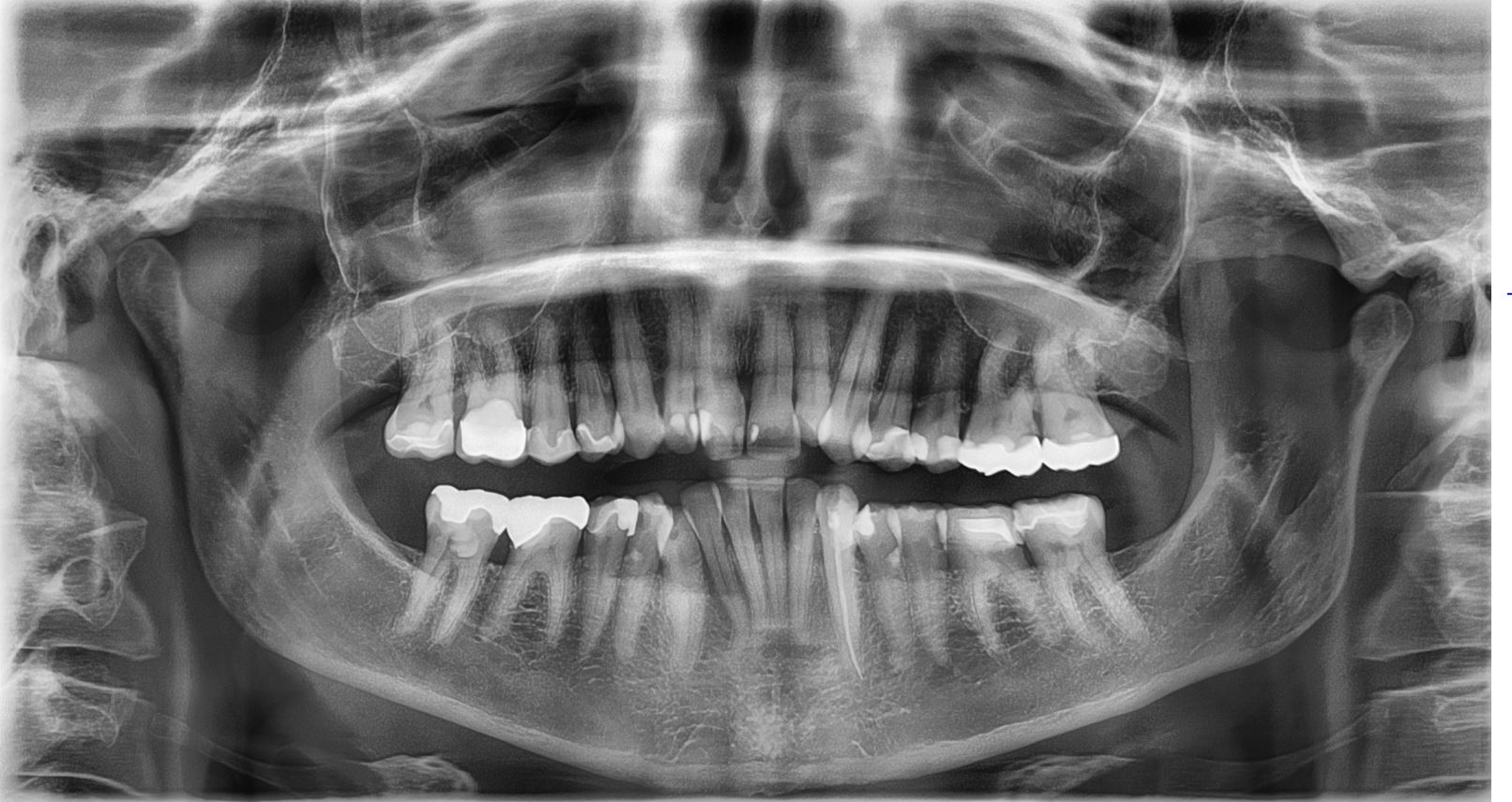 weibliches OPG mit Wurzelbehandlung